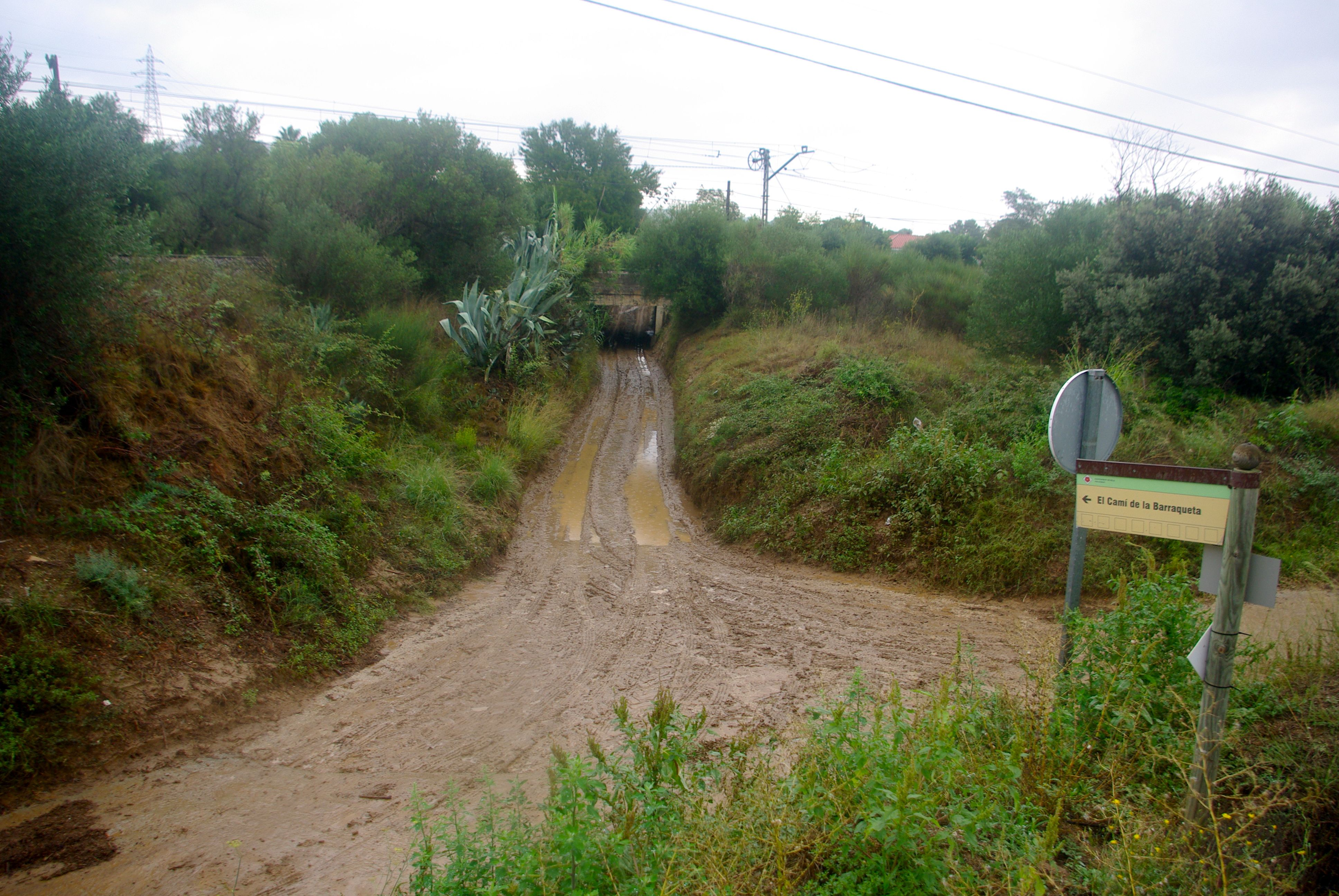 El Camí de la Barraqueta vora la carretera d'Alcolea, al terme de Reus